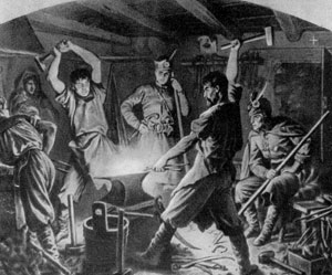 "Куют косы" Польские повстанцы куют оружие - косы. (Офорт)